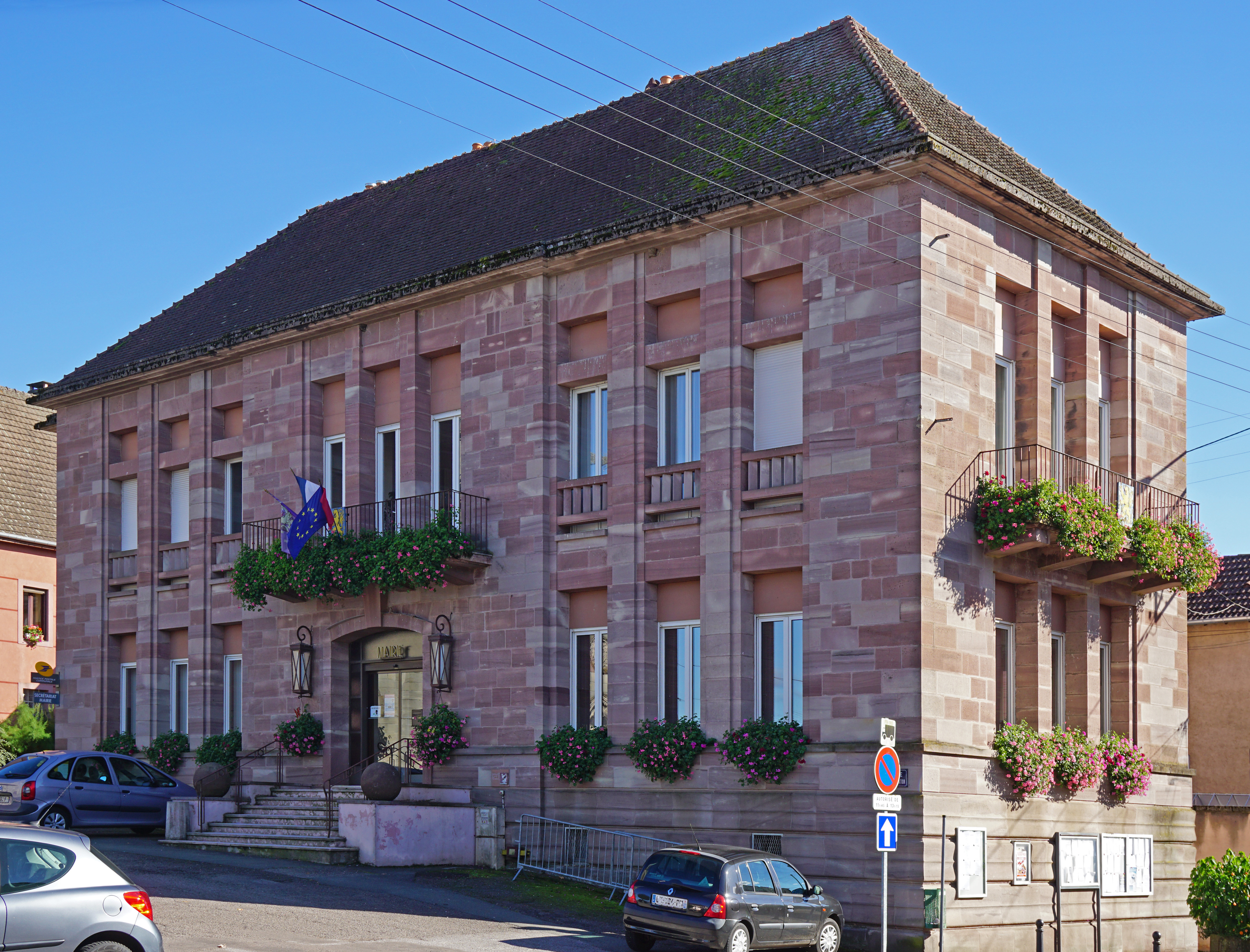 La mairie de Fontaine-lès-Luxeuil.